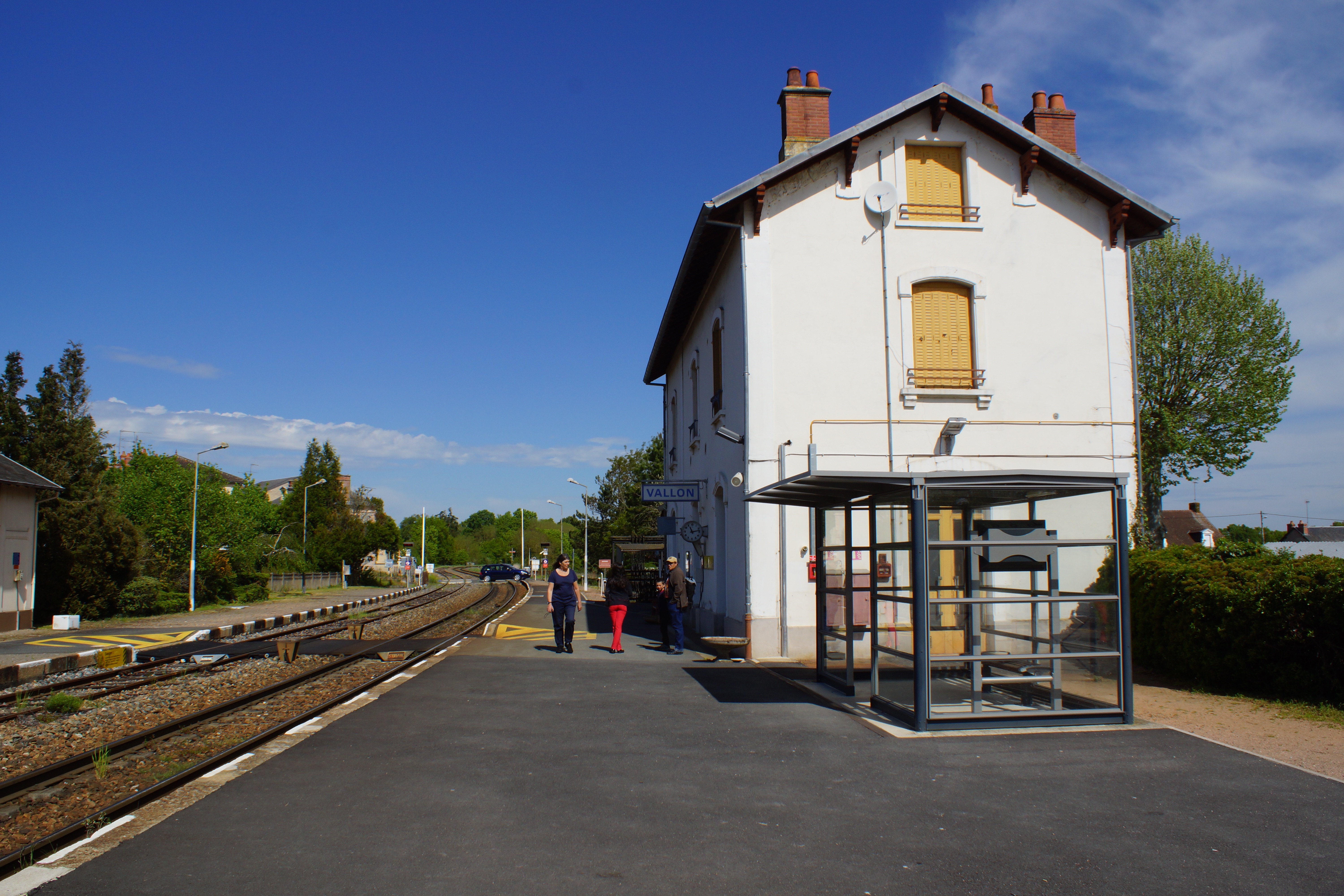 Intérieur de la gare avec à droite l'abri du quai 1 avec le panneau d'informations.